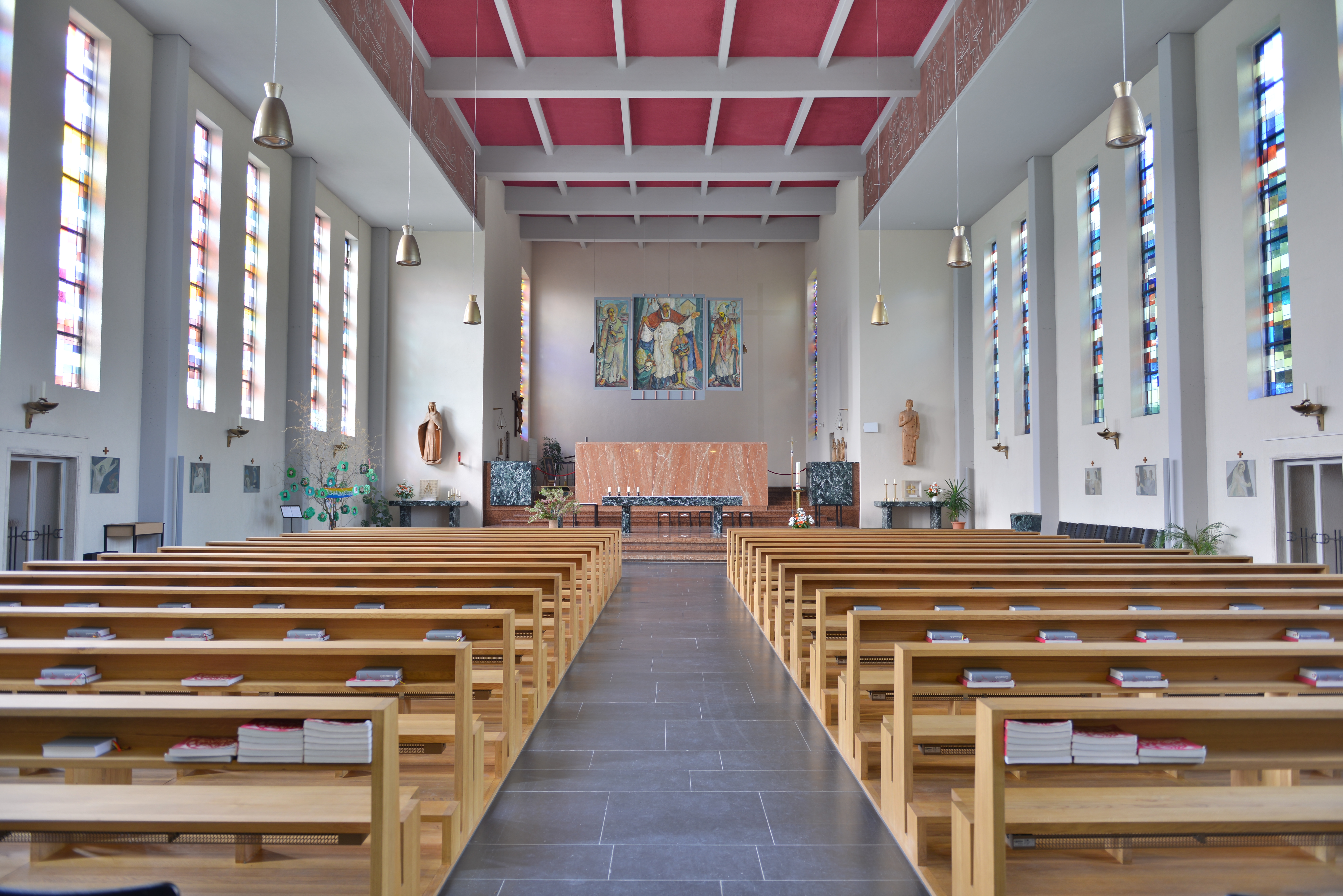 Kath. Pfarrkirche hl. Gebhard in Bregenz Vorkloster, Relativ junger Kirchenbau (1956-1961 nach Plänen von Willibald Braun. Hölzerne Schutzmantelmadonna und Hl. Josef von Emil Gehrer über den Seitenaltären; Orgel (1975) von Herbert Gollini; Glasfenster (1959) von Fritz Krcal, Ausführung Tiroler Glasmalereianstalt. Bei Umbau und Restaurierung 2010/2011 Altar ins Hauptschiff verlegt und freigewordene Apsis zu einem Werktagsgottesdienstraum umgewandelt. Optische Trennung im oberen Bereich durch Triptychon „Das bewegliche St. Gebhardsbild“ von Hubert Berchtold (einst für den Burghof auf dem Gebhardsberg gefertigt).